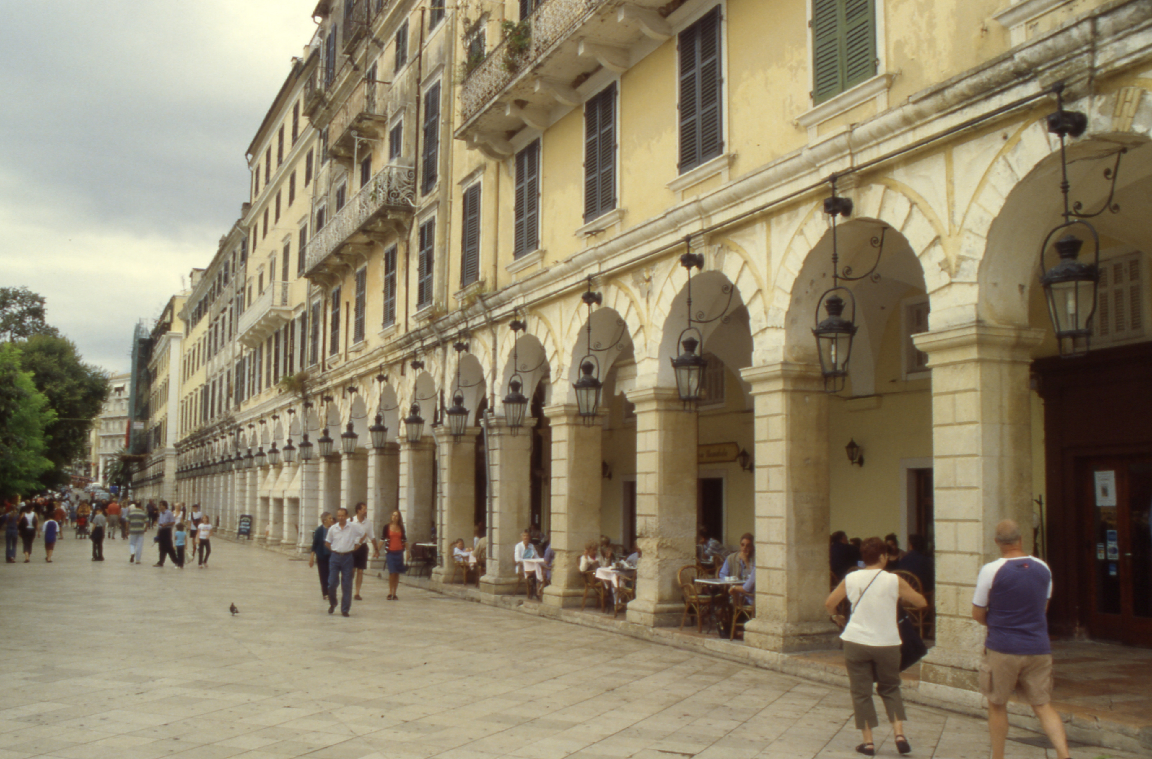 Korfu Ansicht